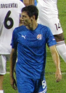 Ante Rukavina